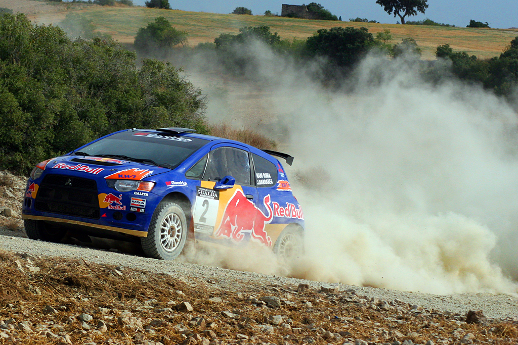 Nani Roma con Mitsubishi Colt en Rally de Terra Ciutat de Cervera 2010